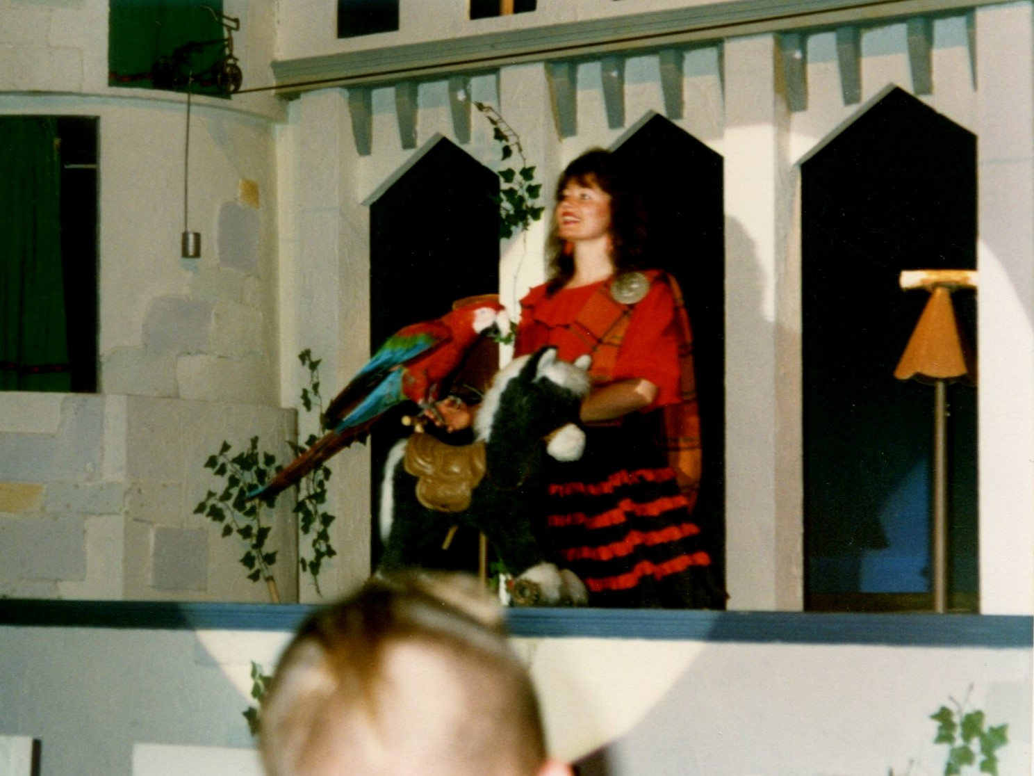 WalibiPerroquets